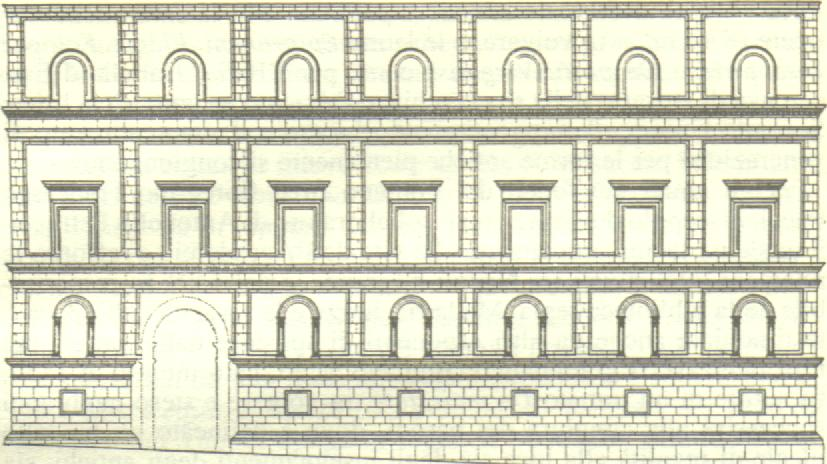 Palazzo del Panormita by a personal engraving's copy